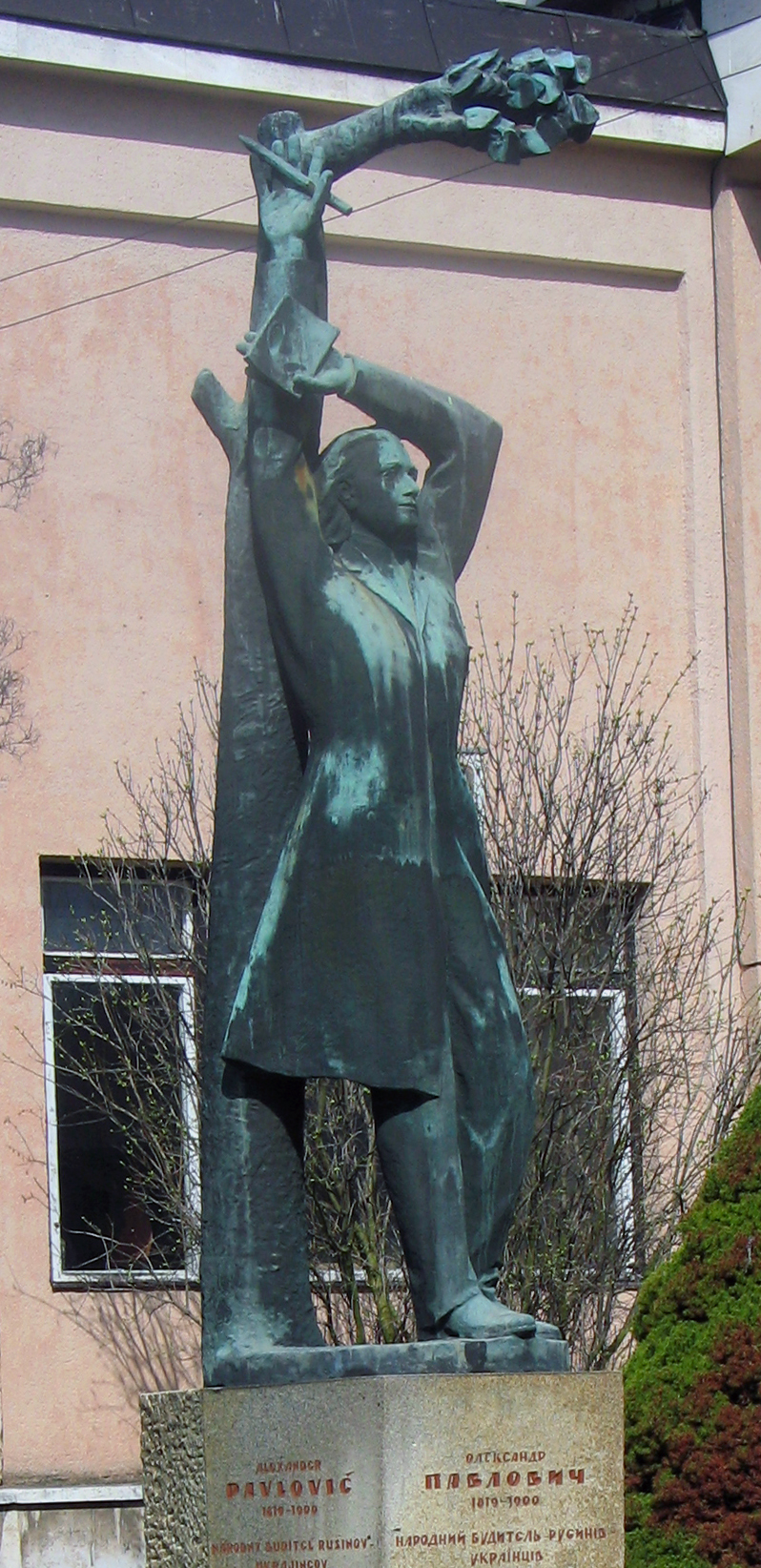 Bronzovú plastiku Alexandra Pavloviča v roku 1969 vo Svidníku realizoval František Gibala